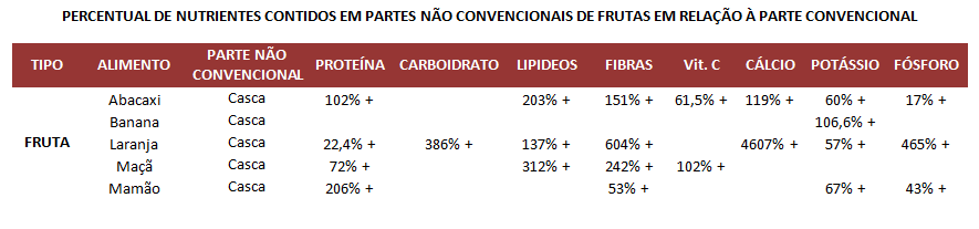 Relação entre nutrientes contidos em partes não convencionais de frutas e partes convencionais.